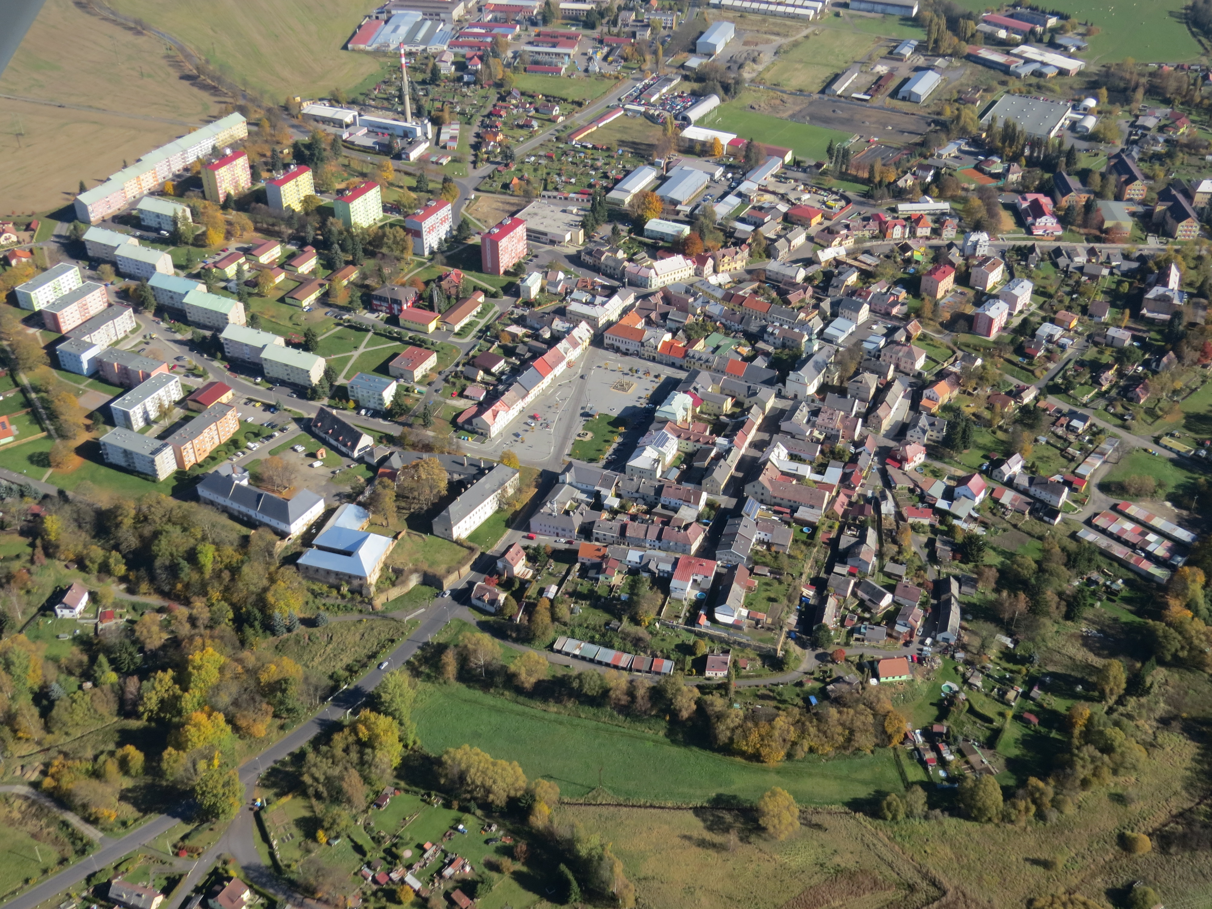 Město Toužim, historické jádro a sídliště.